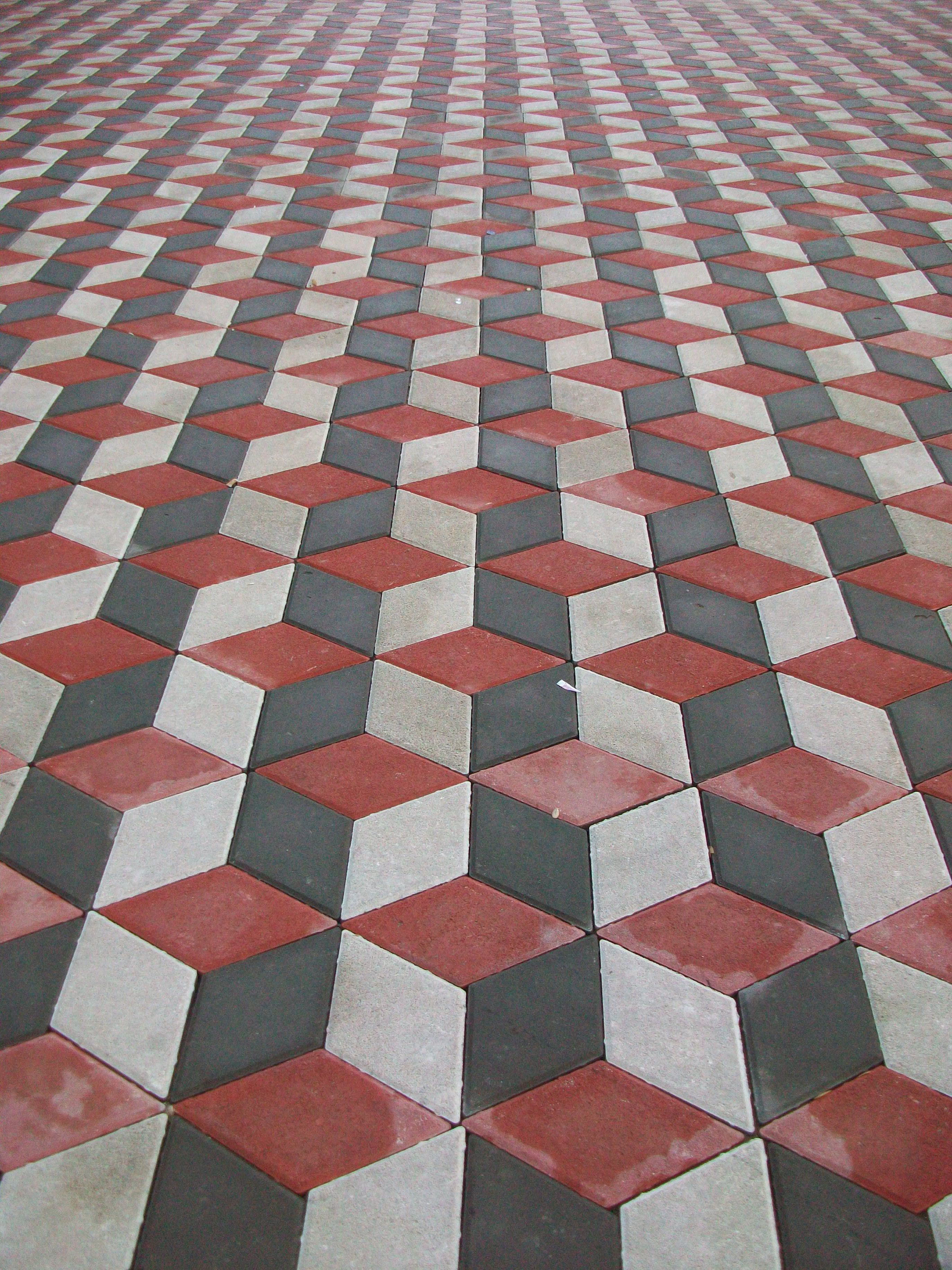 Ankara Yenimahalle'de Kaldırım Taşları.